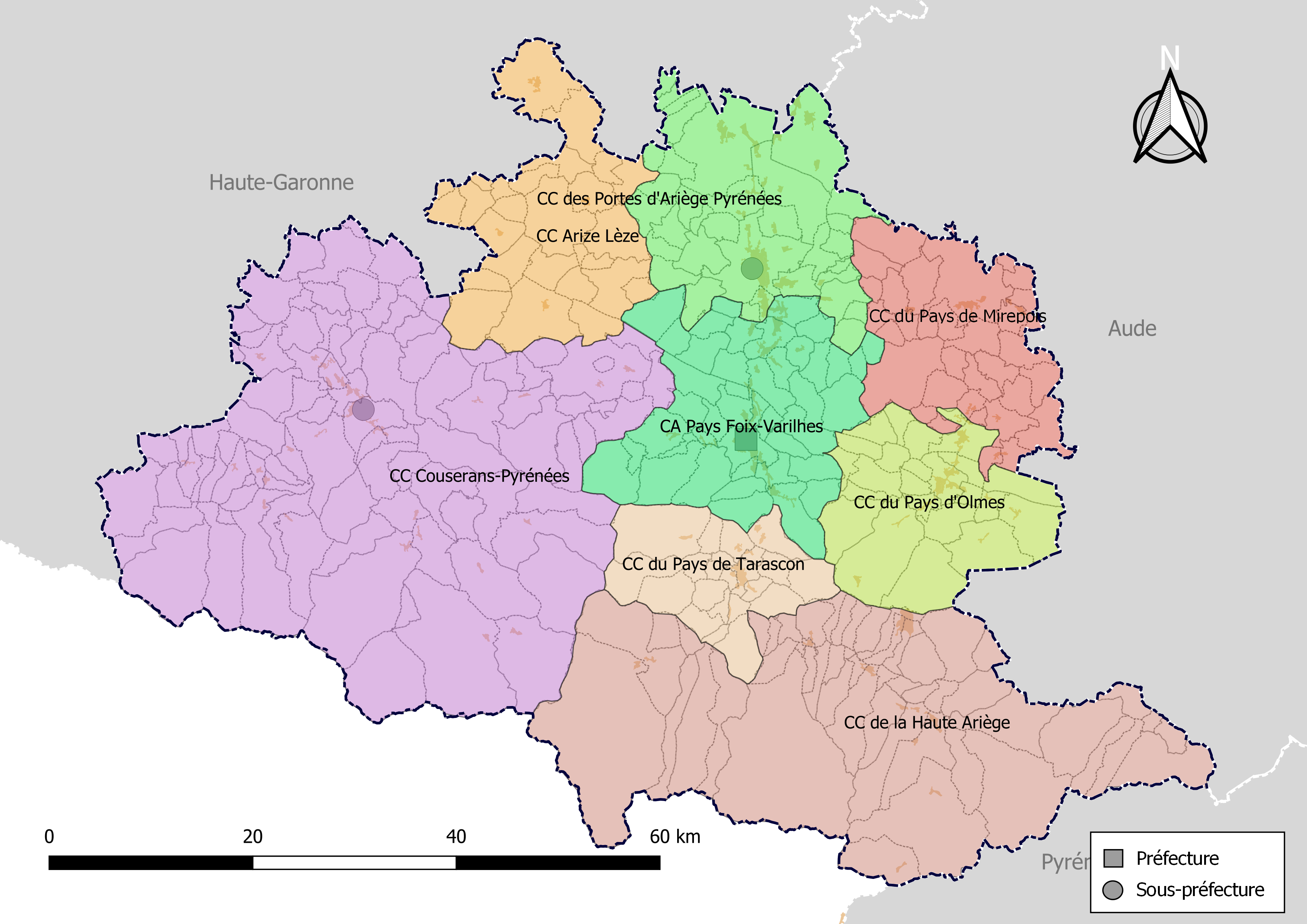 Carte des intercommunalités du département de l'Ariège, France. Composition au 1er janvier 2019